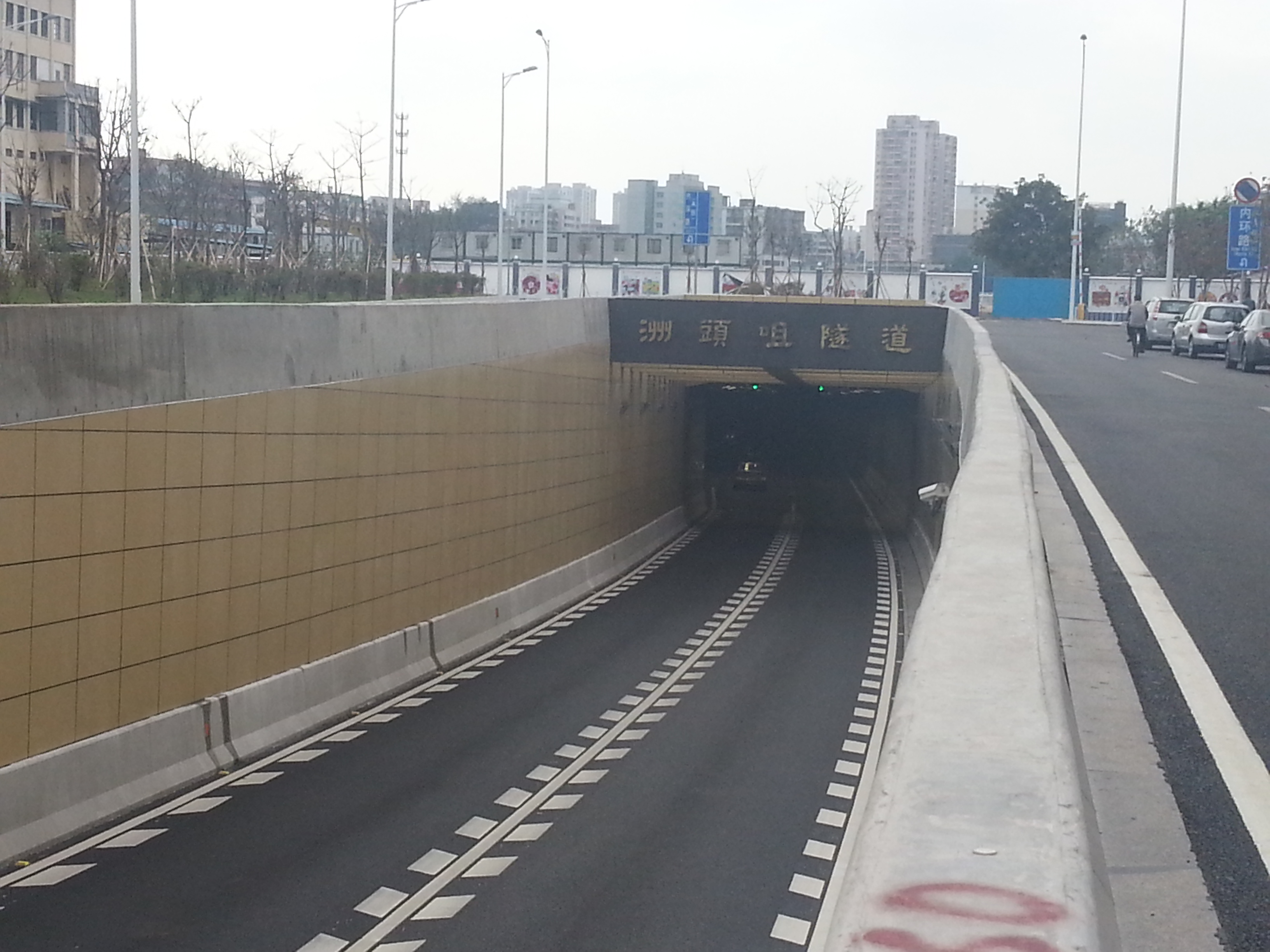 廣州市洲頭咀隧道